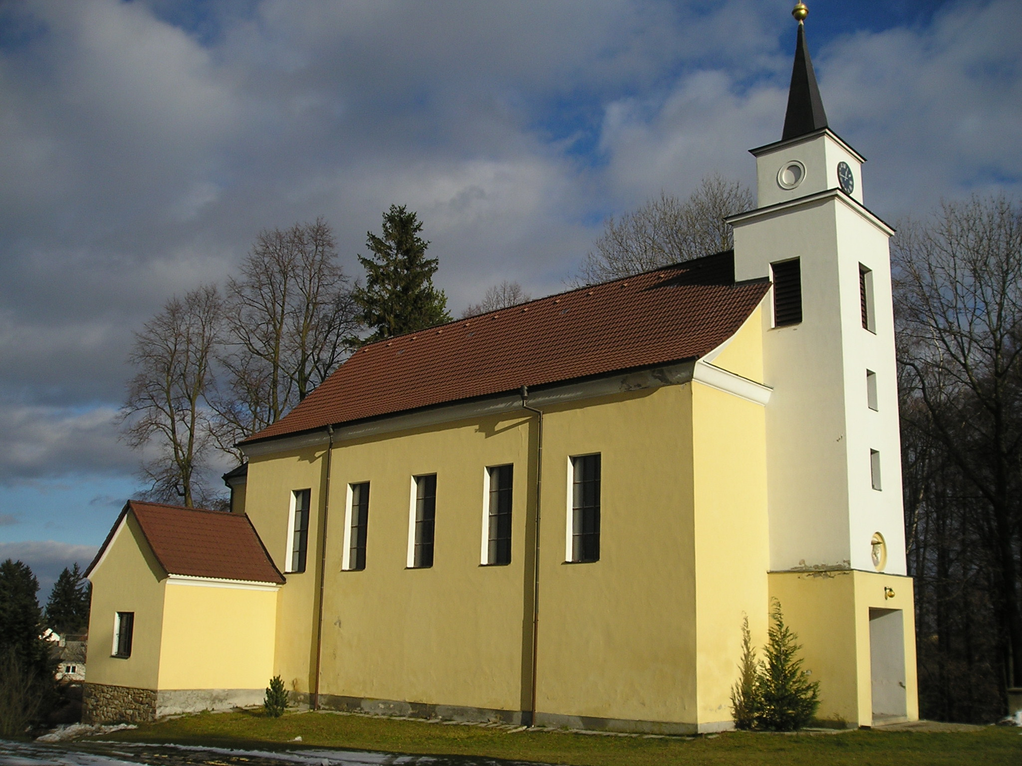 kostel v Puklicích